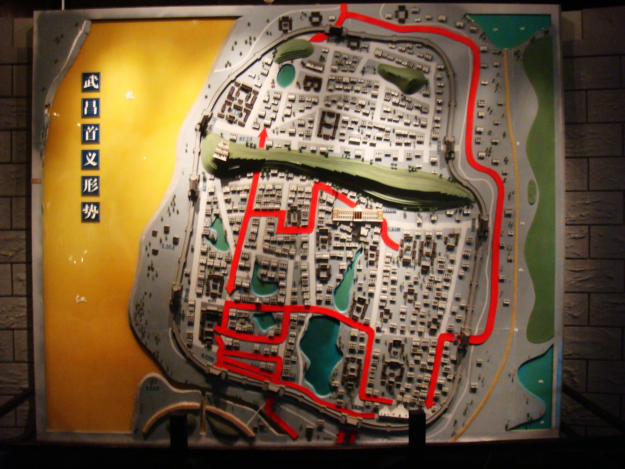 武汉博物馆馆藏，武昌起义形势模型。